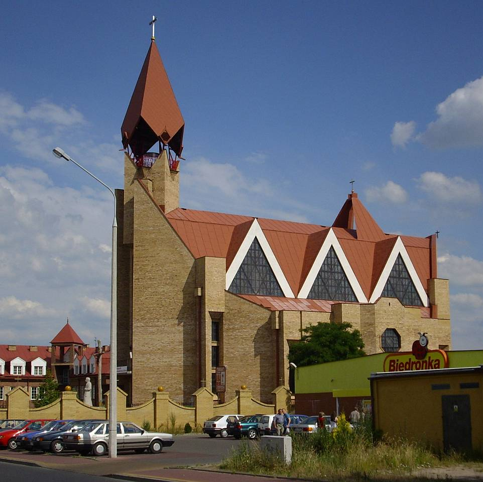 Kościół pw. Chrystusa Miłosiernego przy ul. Kardynała Wyszyńskiego 53-55 w Białej Podlaskiej.